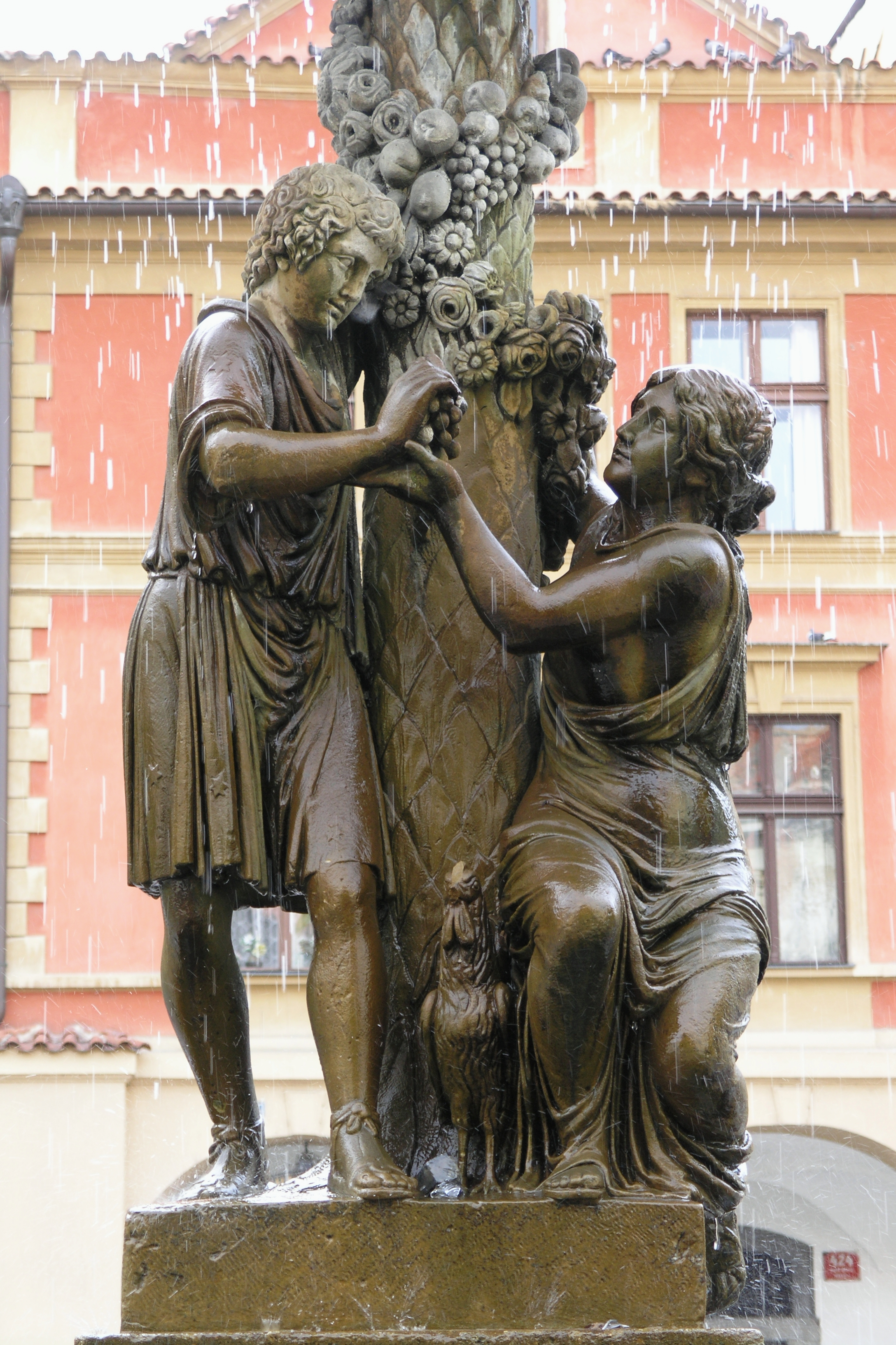 Praha, Staré Město - Wimmerova kašna